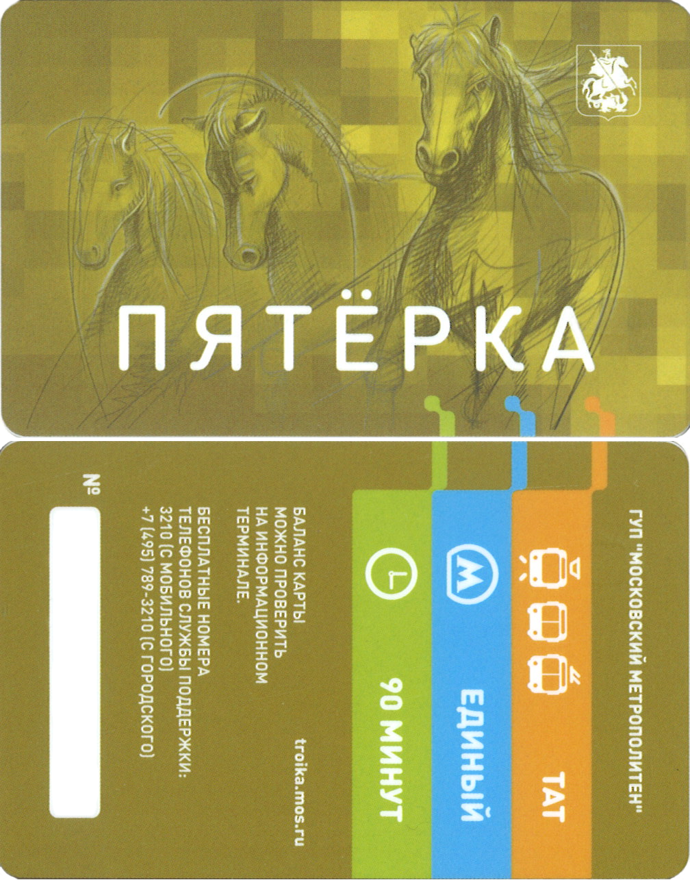 Электронный кошелёк для проезда в общественном транспорте Москвы